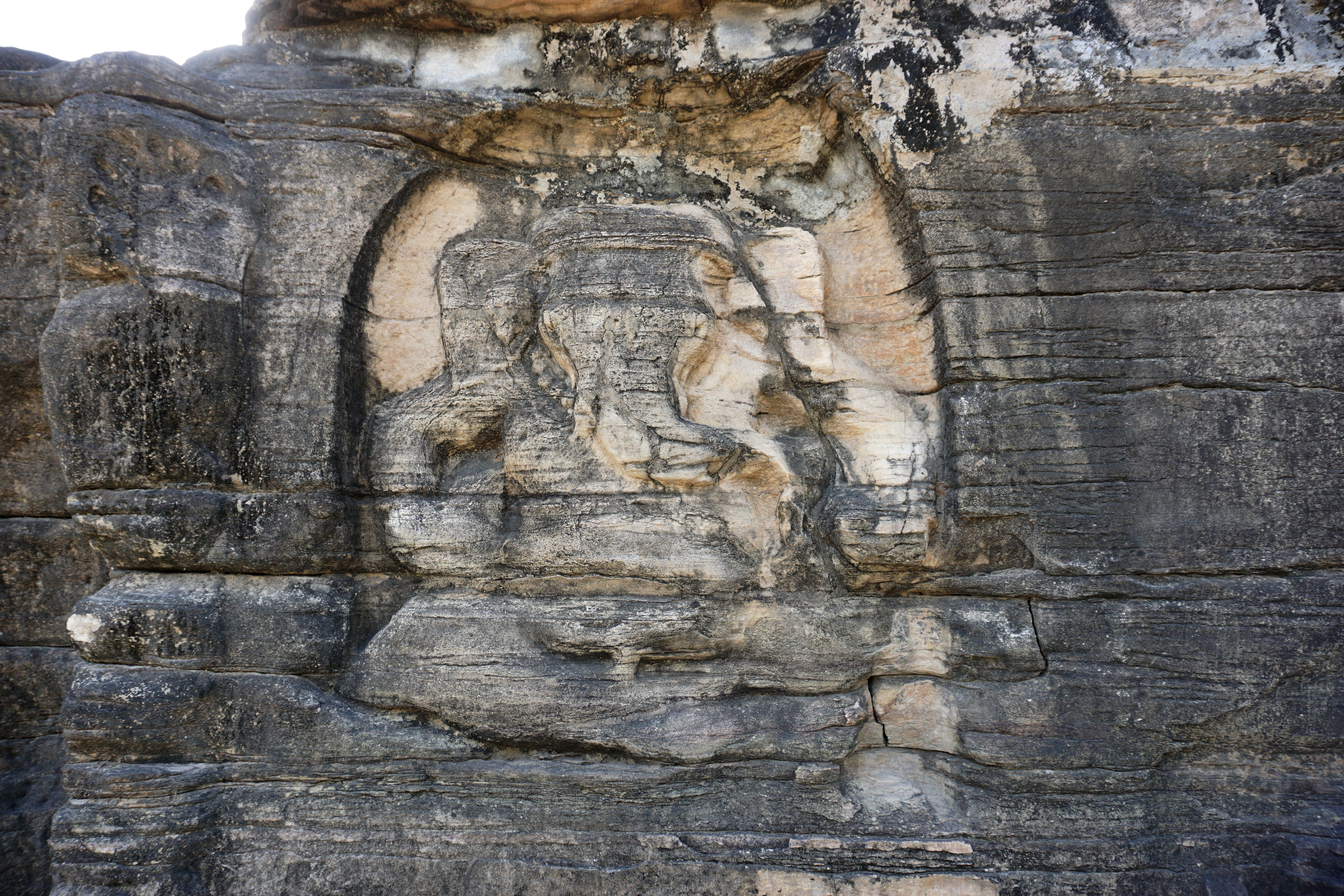 Udayagiri Caves, Vidisha, India